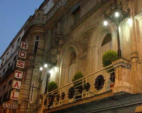 Fachada Romanticismo hostal Pizarro. Antigua sede del diario El Correo Español conocida como "la Casa de los Tradicionalistas".